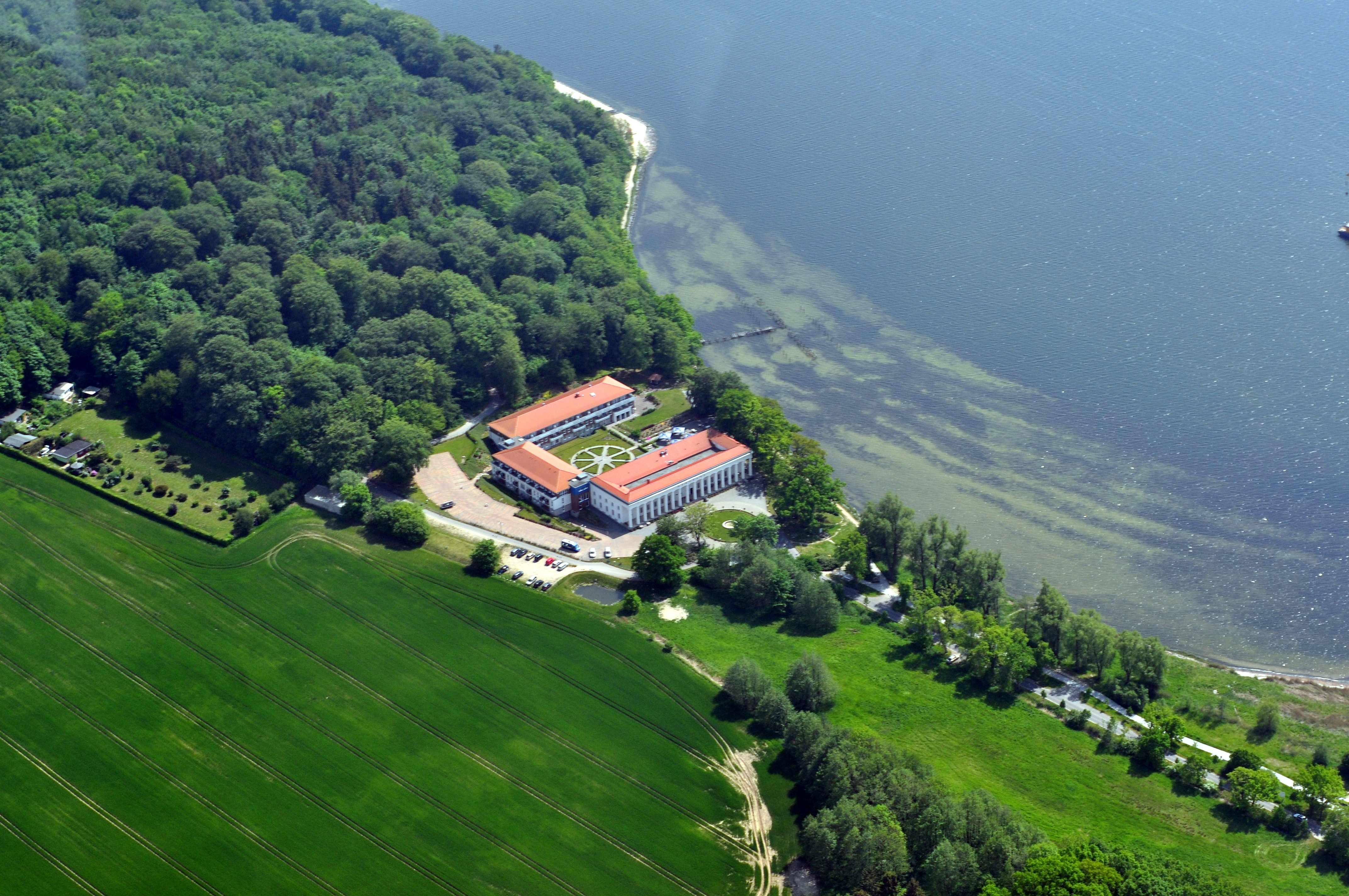 Die Bilder wurden von mir während eines einstündigen Rundflugs ab Flugplatz Güttin am 21. Mai 2011 aufgenommen. Die Bildbeschreibung steht im Dateinamen. Aufgenommen mit einer Nikon D5000 durch das Seitenfenster des Flugzeugs.